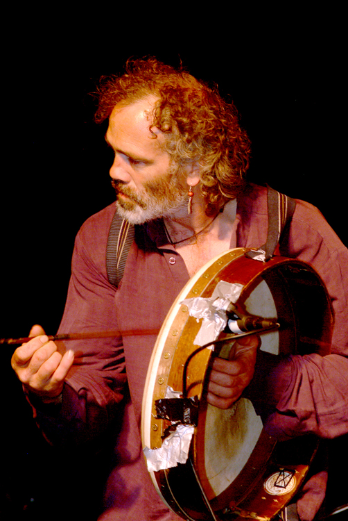 El músico Rónán Ó Snodaigh, miembro de la banda de folk irlandes KILA, durante su actuación en el festival SonCelta en la localidad gallega de Porto do Son en Julio del 2009